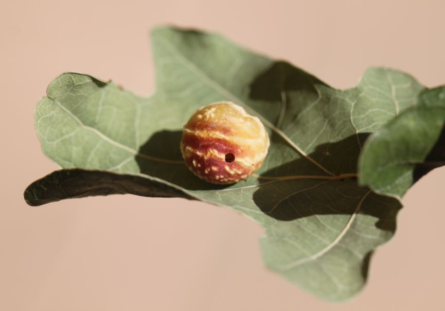 Galle der Gallwespe Cynips longiventris an einem Eichenblatt mit dem Loch einer Erzwespe der Gattung Torymus, am 3. September 2019 in der Schwetzinger Hardt